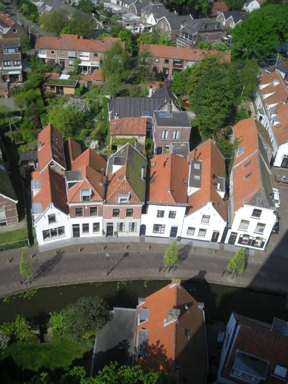 Bovenaanzicht vanuit de kerk, gedeelte 's Herenstraat